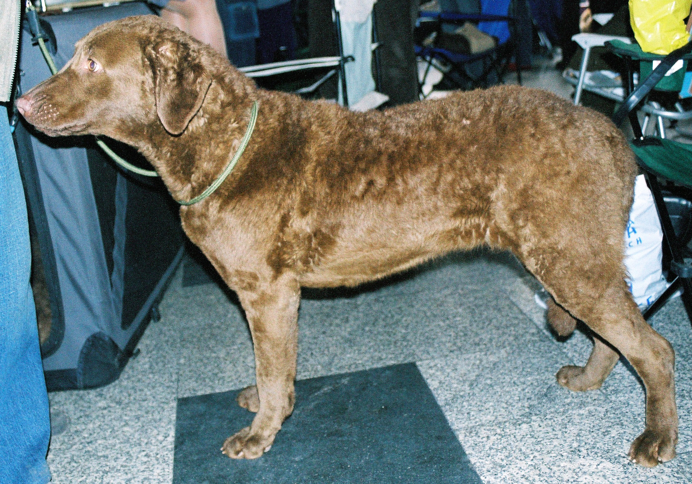 autor: Pleple2000 19:54, 4 April 2006 (UTC)